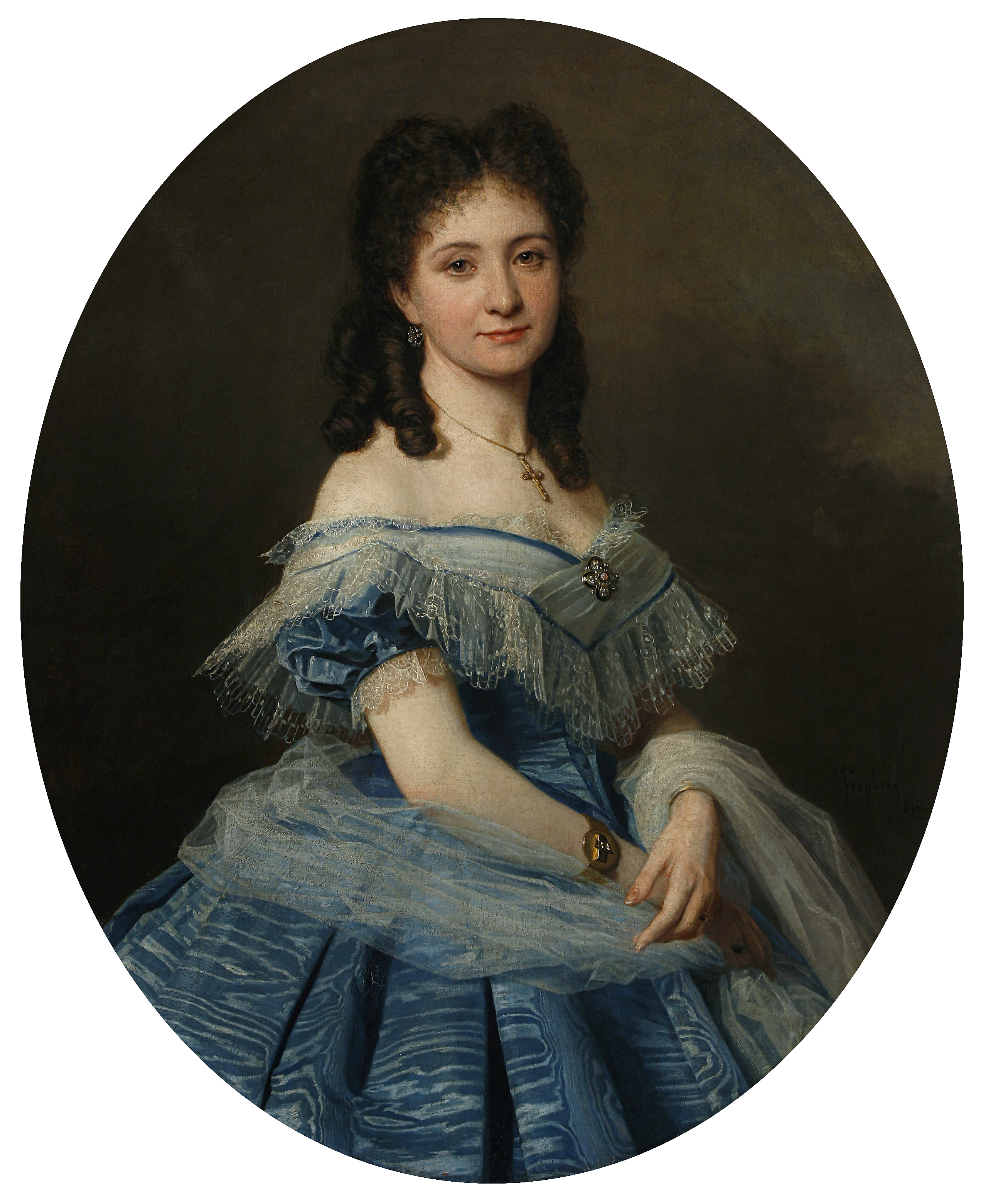 Portrait Opernsängerin Luise Limbach (1840–1909), 1896 dem Museum geschenkt